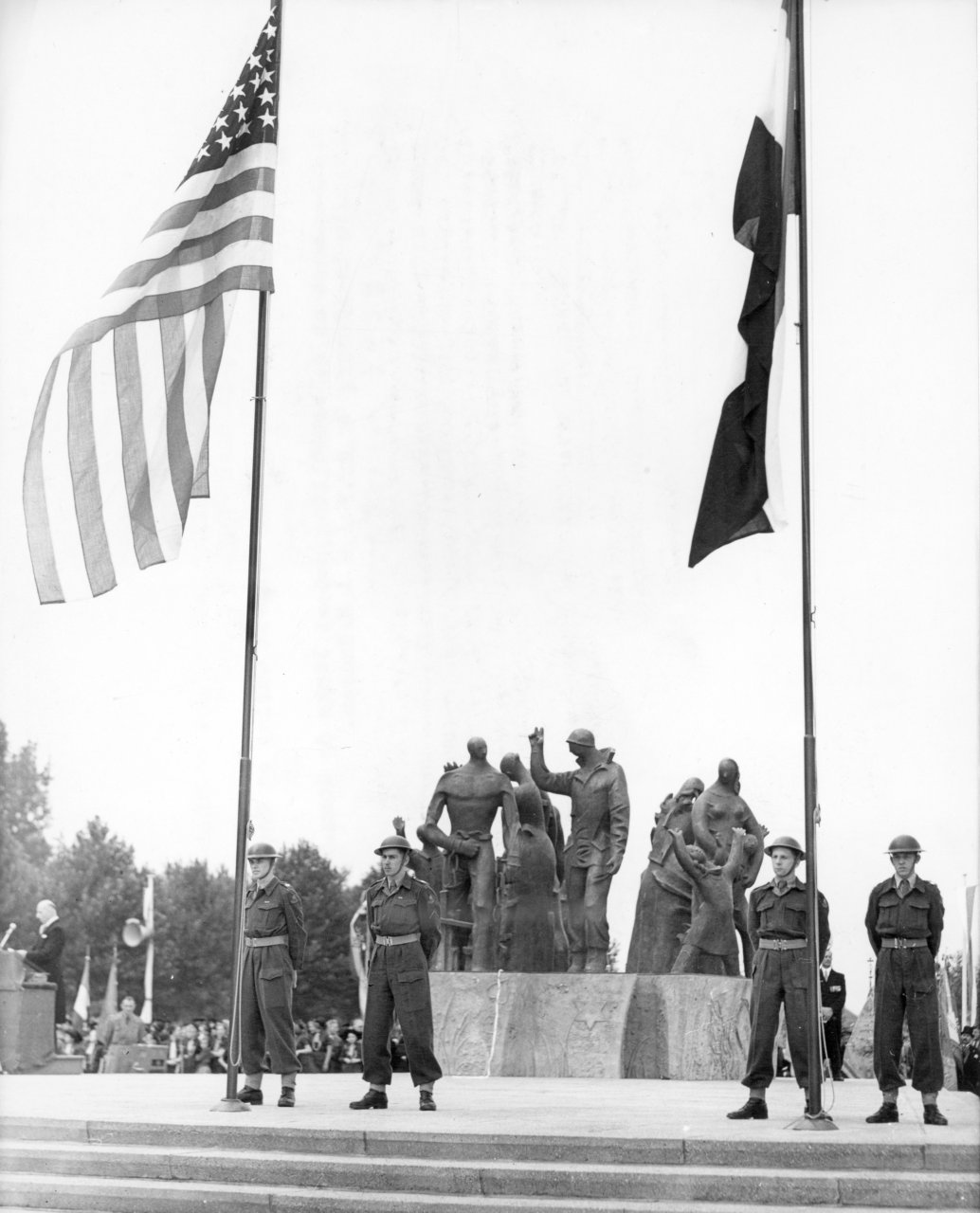 Het Limburgs Bevrijdingsmonument herinnert de inwoners van Maastricht aan de verschrikkingen van de Tweede Wereldoorlog, aan het Limburgse verzet dat met gevaar voor eigen leven tegen de bezetter heeft gestreden en aan de bevrijding van de stad door de Amerikaanse troepen. Commissaris van de koningin Frans Houben houdt een rede bij de onthulling van het monument. Collectie: Fotocollectie Elsevier Fotograaf: Onbekende Anefo fotograaf Bestanddeelnummer 047-0587 Original at Nationaal Archief with id